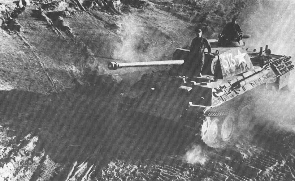 Panzerkampfwagen V ukořistěný Rudou armádou